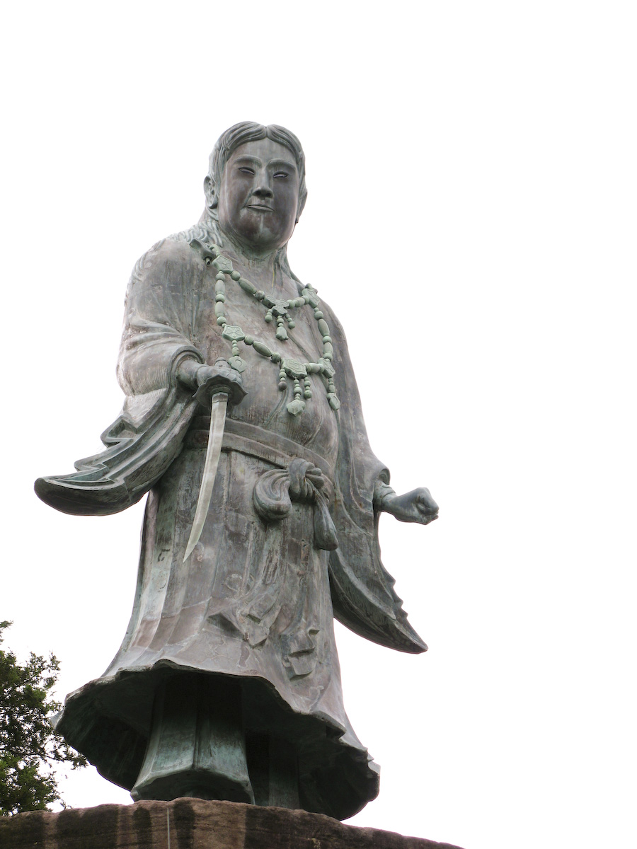 Kenroku-en, Kanazawa, Ishikawa Prefecture, Japan Statue of Yamato Takeru